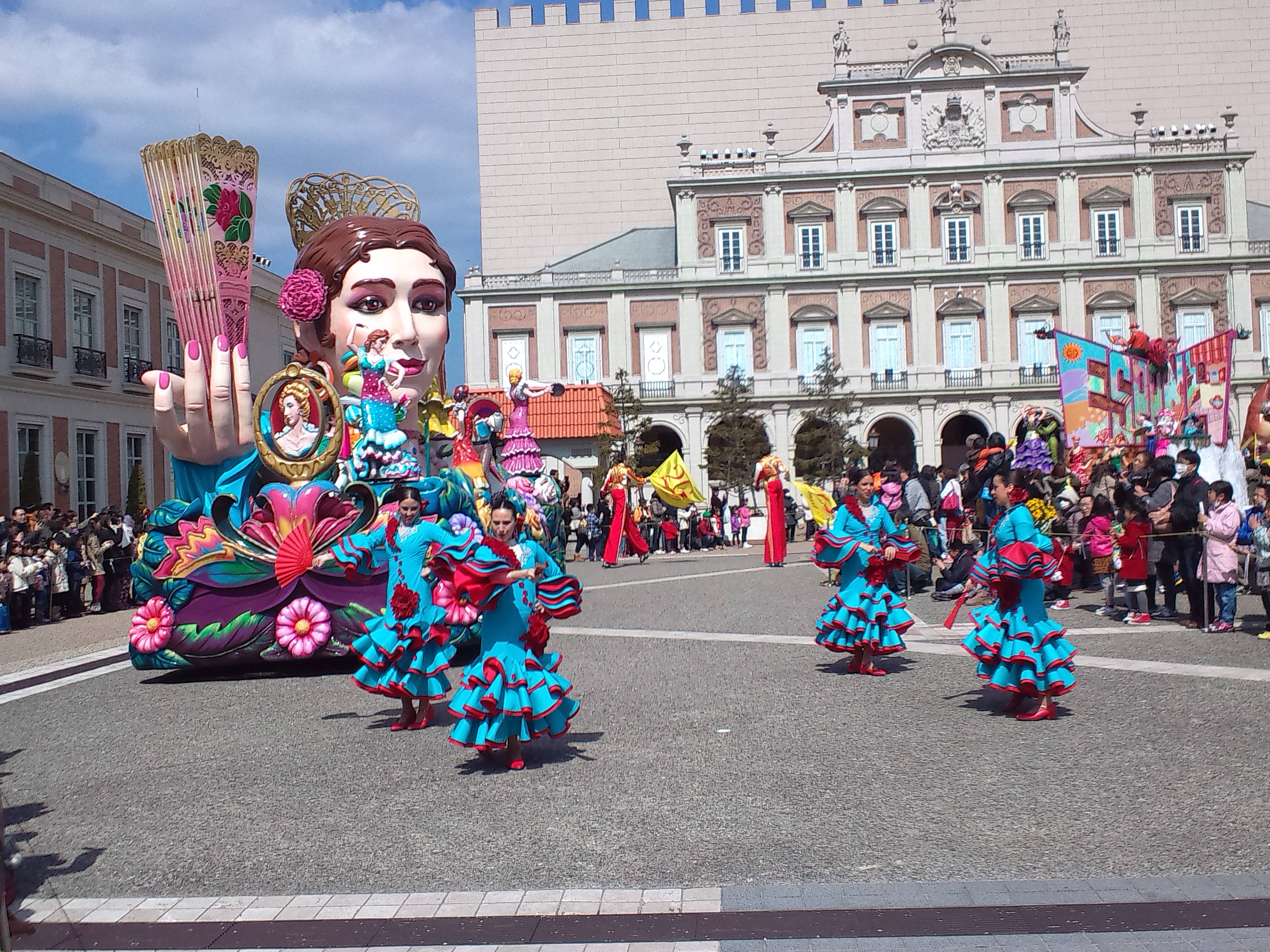 志摩スペイン村、パルケエスパーニャ カーニバル（2014年）